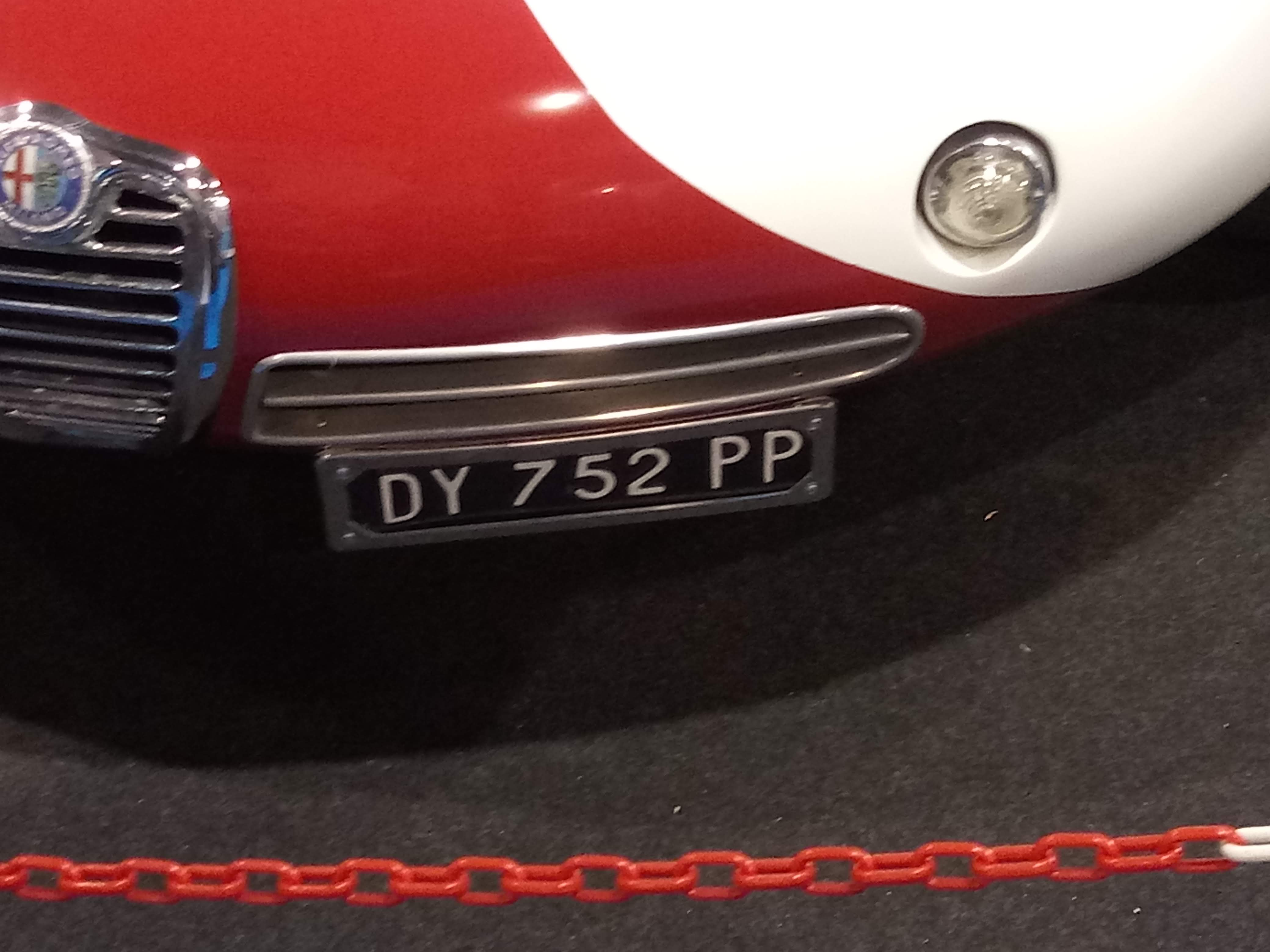 La foto rappresenta la targa anteriore antichizzata di un'Alfa Romeo SZ coda tronca del 1962 (44 esemplari prodotti); l'esemplare è stato visto alla fiera di Padova "Auto e moto d'epoca", il 26/10/2019